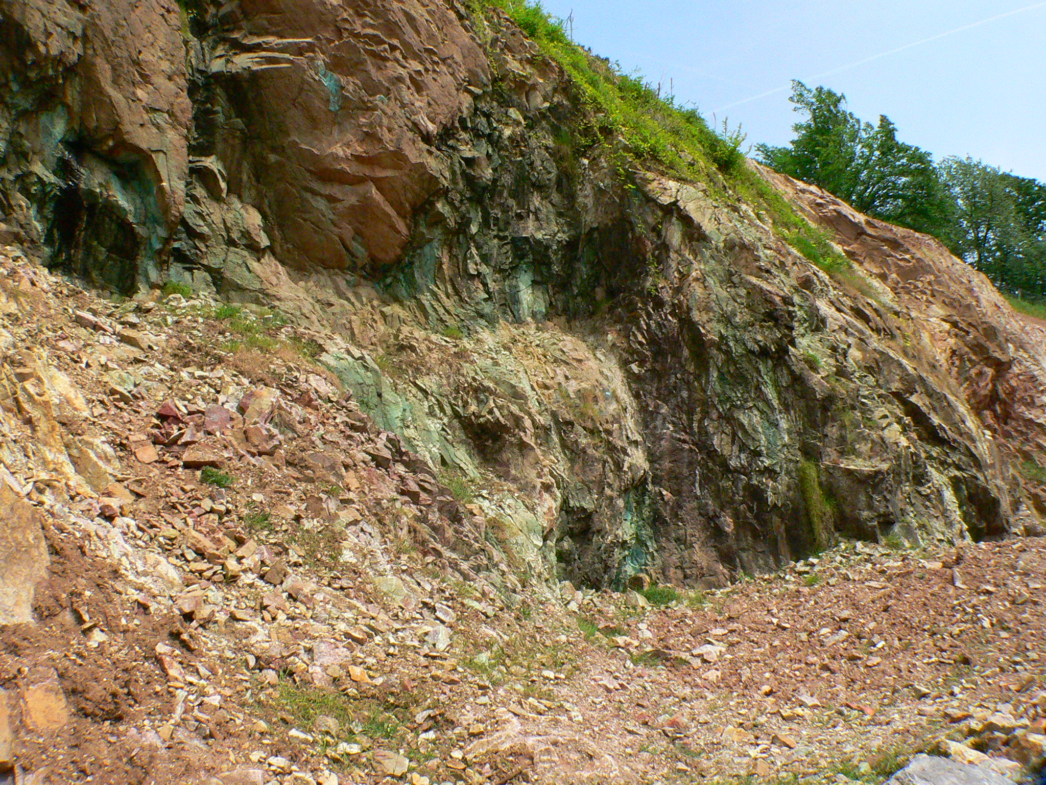 ehem. Kupfertagebau "Grube Wilhelmine" in Sommerkahl bei Aschaffenburg, Deutschland - Tagebauwand mit Verfärbungen durch Malachit und Azurit